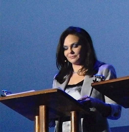 Zdjęcie zrobione podczas międzynarodowego festiwalu kina niezależnego Off Plus Camera 2010 w Krakowie.